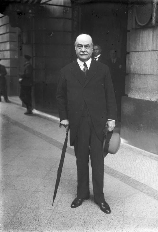 Ein Amerikaner erhält den Friedensnobelpreis für 1931! Nicholaus Murray Butler, der Präsident der Columbia Universität in New York und Vorsitzender der Carnegie-Stiftung für internationalen Frieden ist der diesjährige Friedensnobelpreis zugesprochen worden